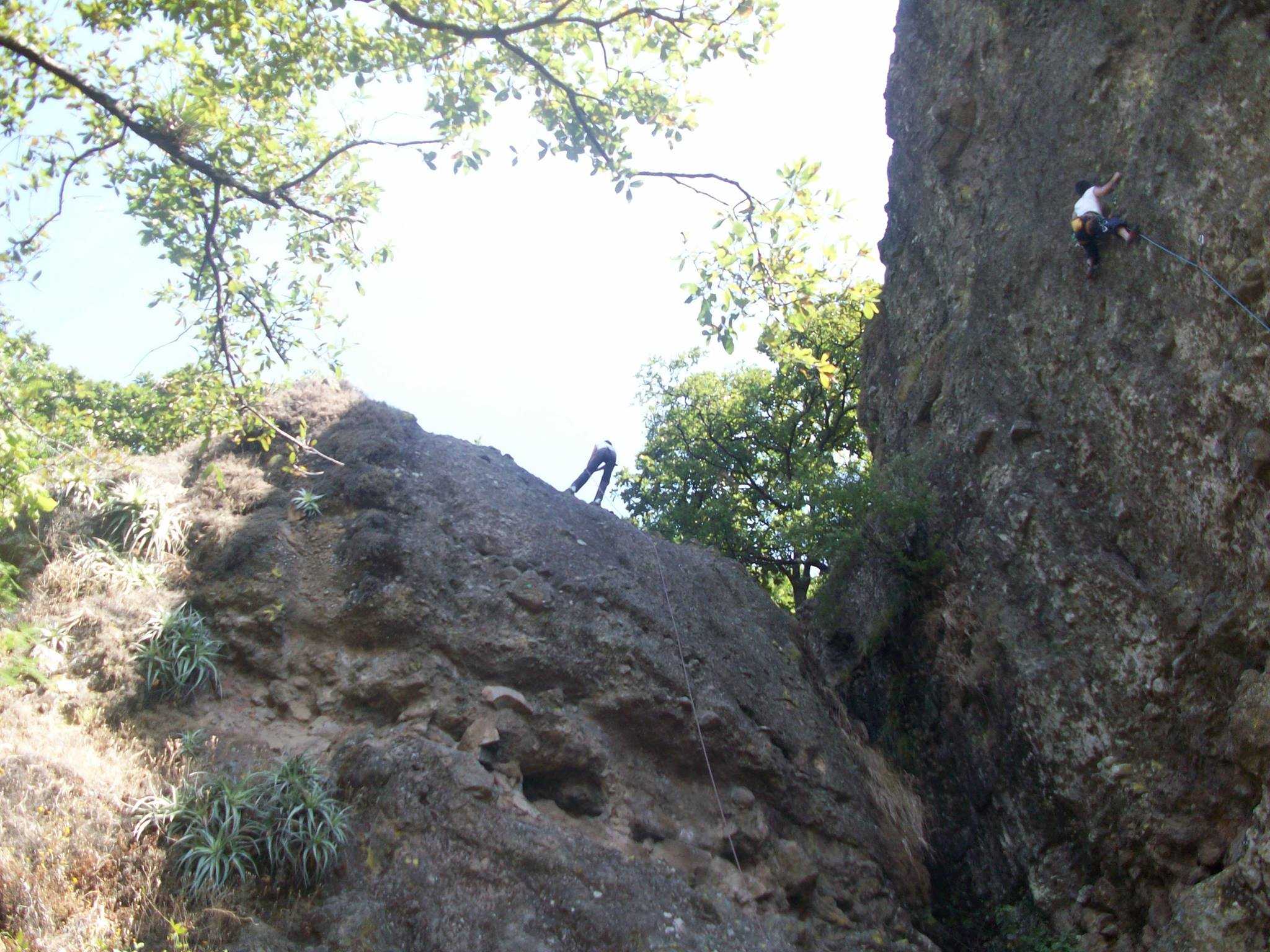 "Dado" y "Dadito". Salientes de roca en el cerro de Meztitla